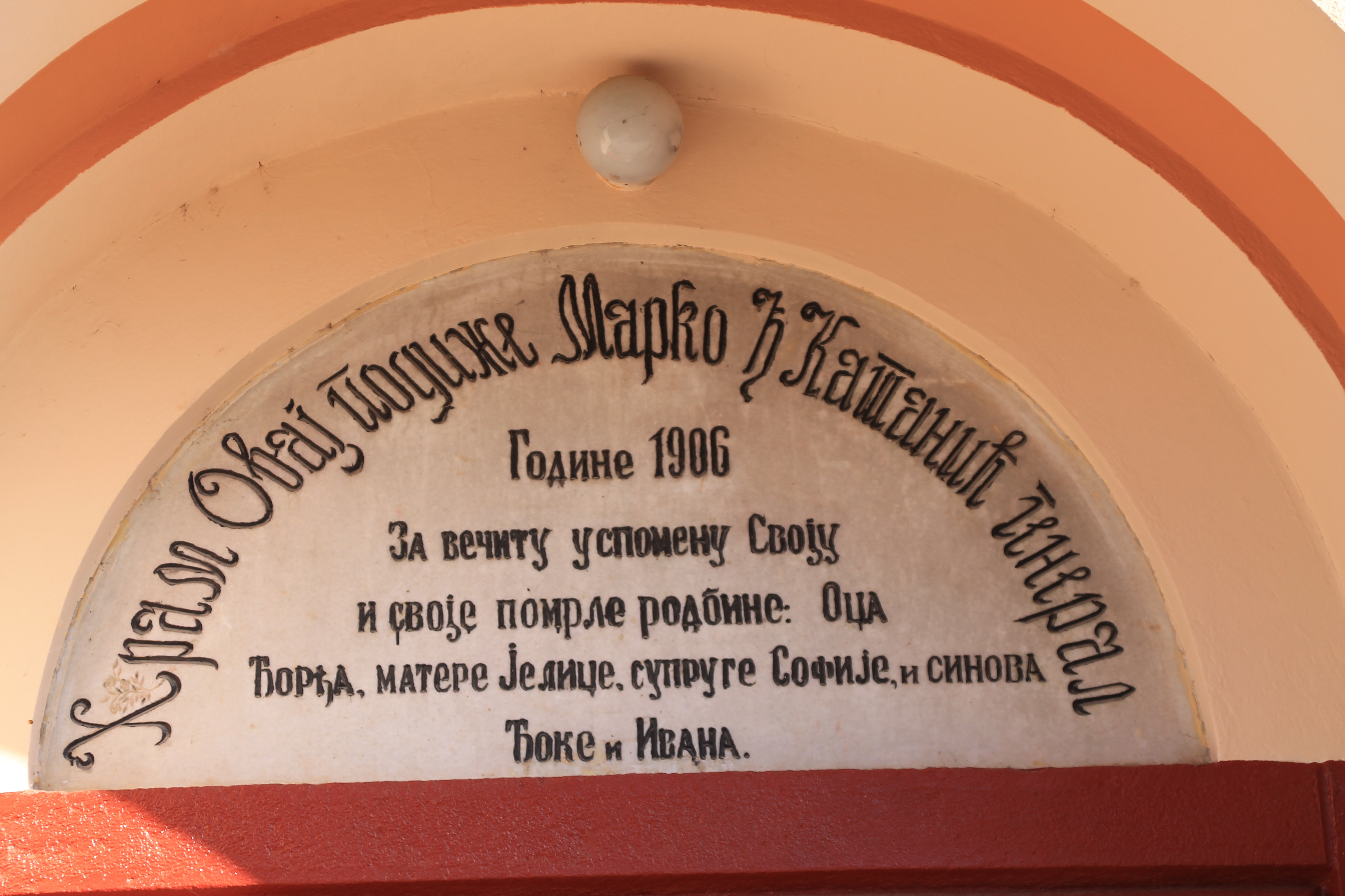 Crkva Sv. Marka (Bresnica)